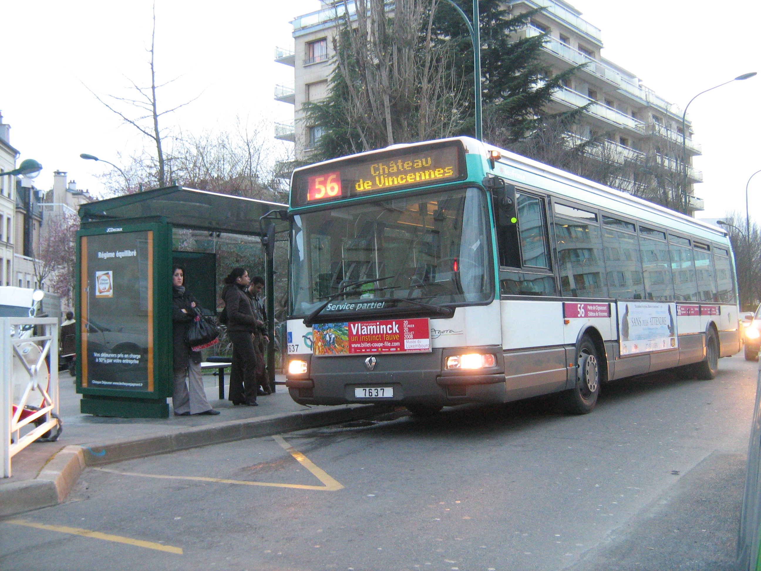 L'Agora V2 7637 à Vincennes RER - République